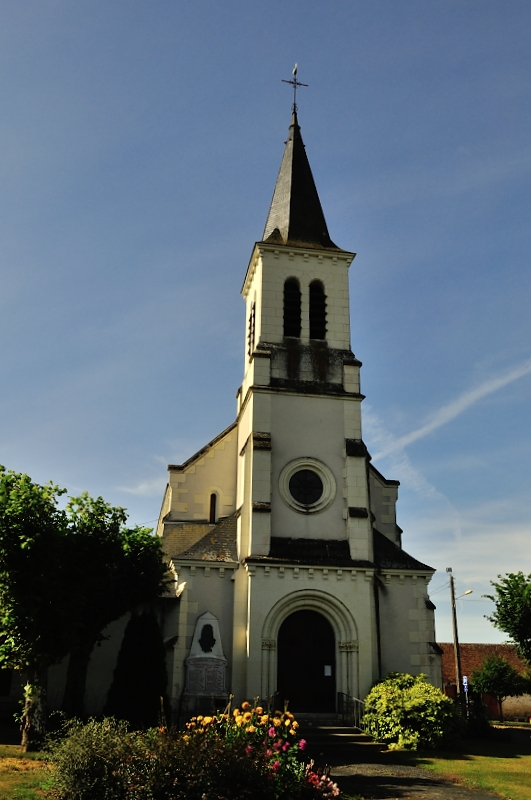 Aize (Indre) - Eglise Saint-Hialire